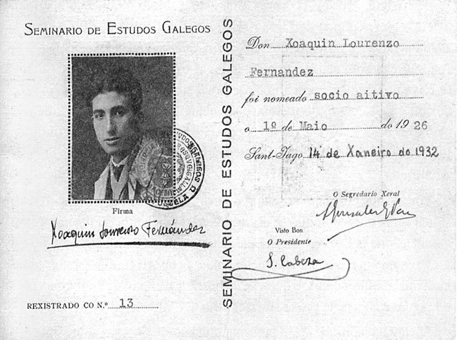 Xaquín Lorenzo